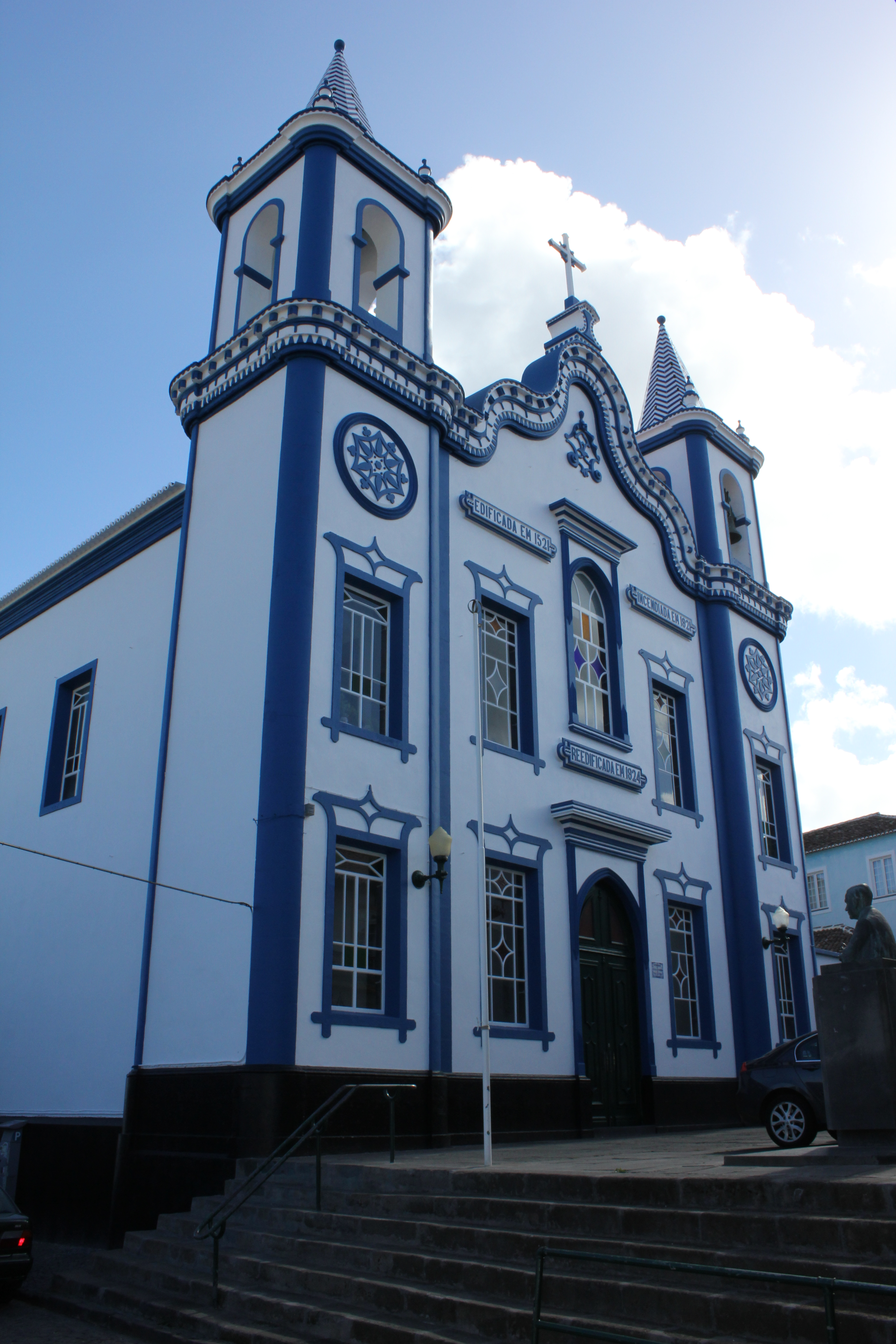 Igreja do Senhor Santo Cristo das Misericórdias